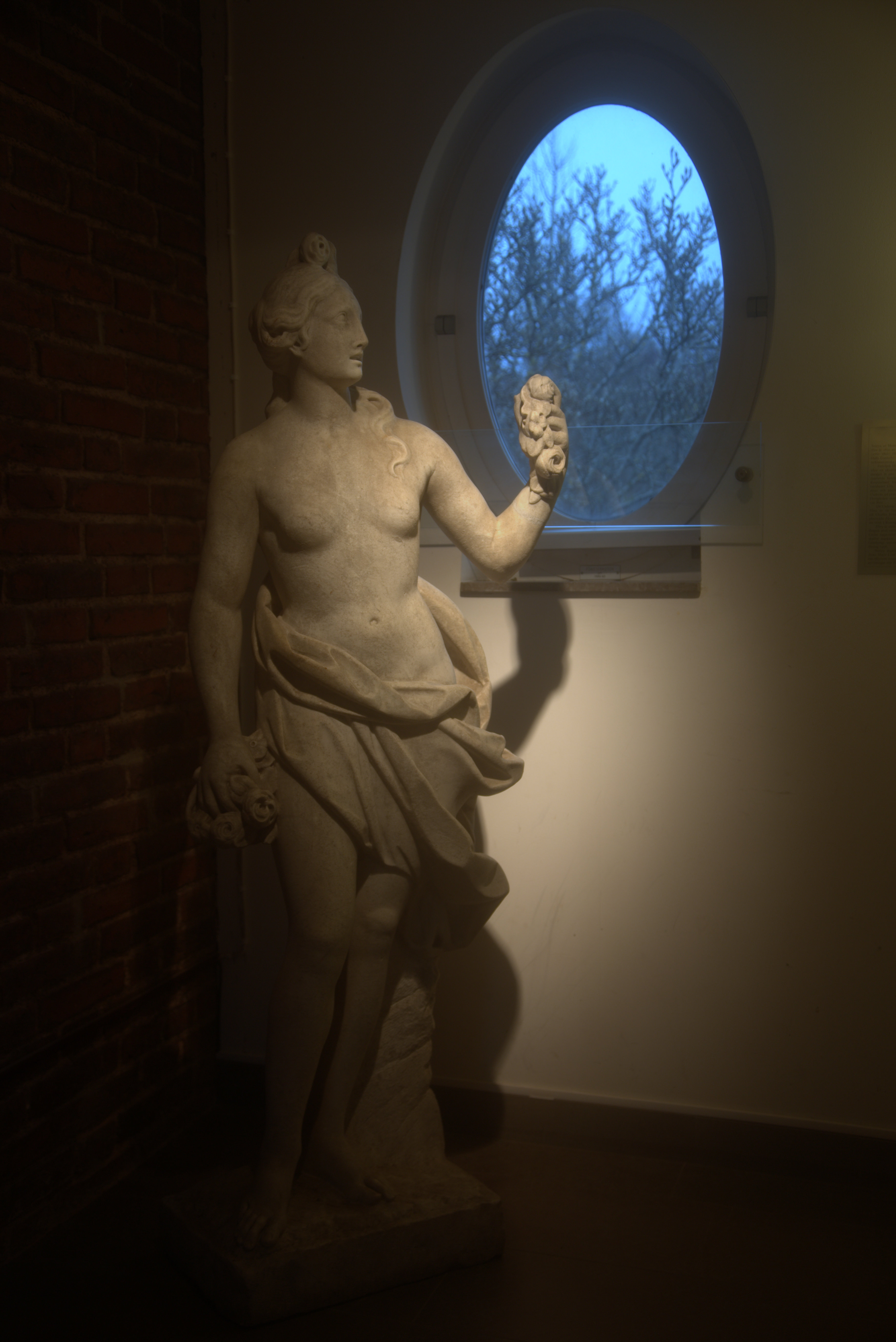 Statyn Flora av Gioaccihion Frulli. Statyn gjordes på 1790-talet och är placerad i butiken i Göteborgs botaniska trädgård.